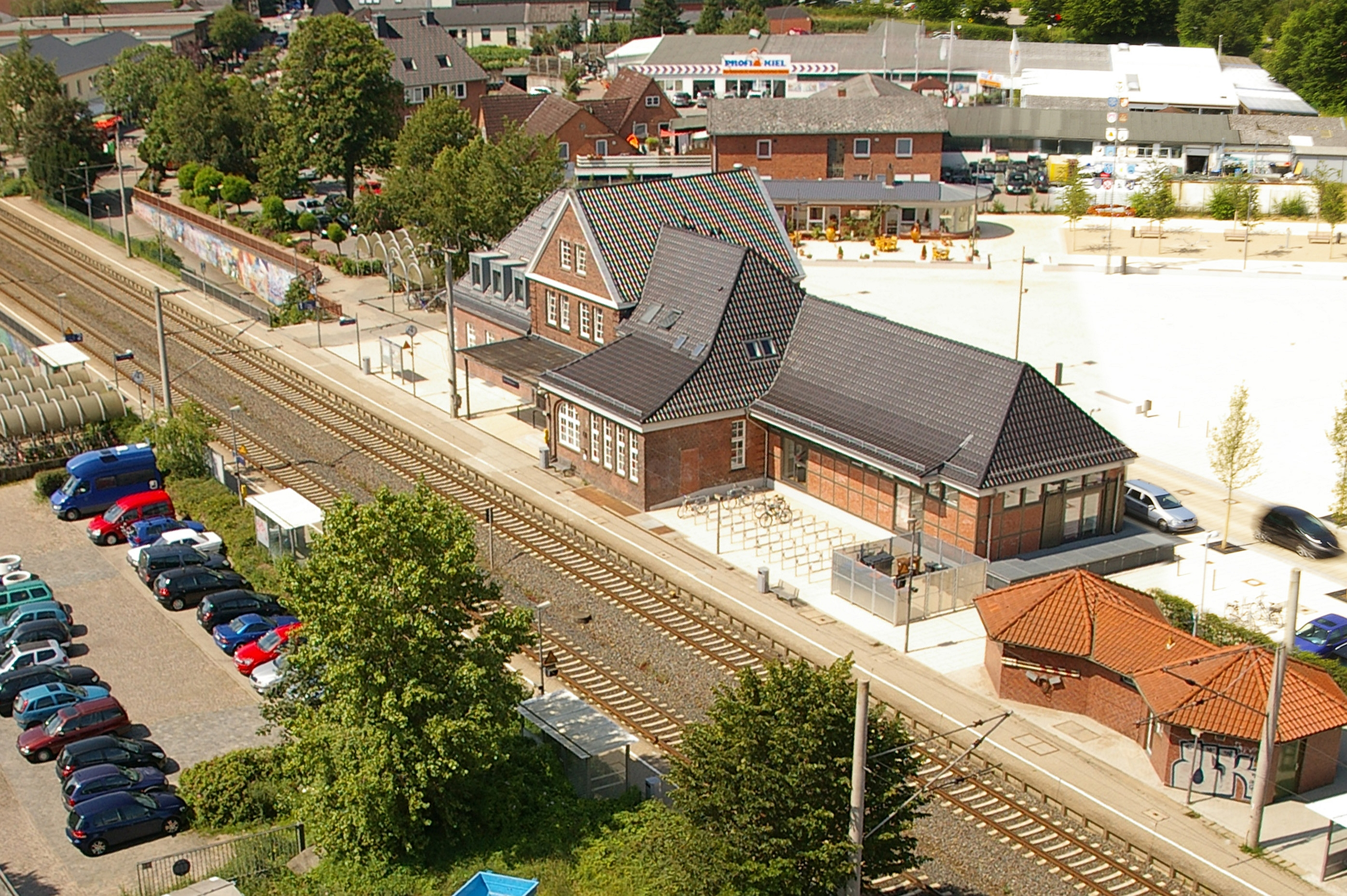 Luftaufnahme vom Bahnhof Bordesholm im Sommer 2011